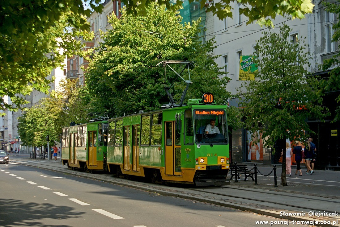 Moderus Alfa HF 01 jako 30/13 jedzie do Stadionu Miejskiego dowożąc kibiców na mecz Lech Poznań- Korona Kielce (2:0). 11.08.2013